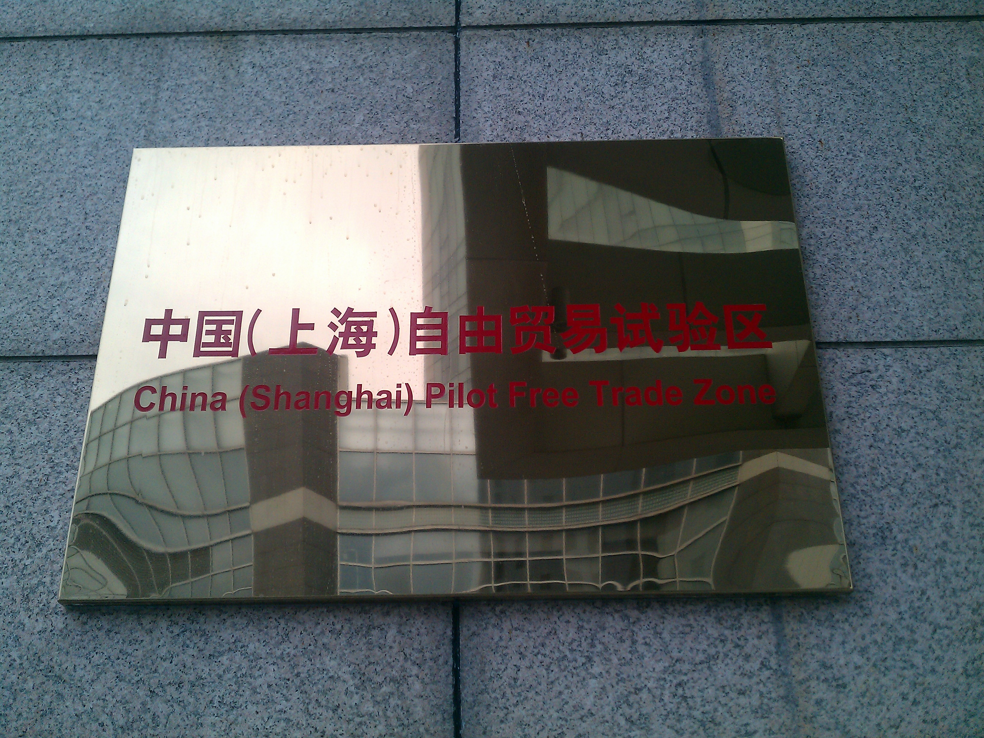 中文（中国大陆）: 中国（上海）自由贸易试验区管委会门口铜牌。